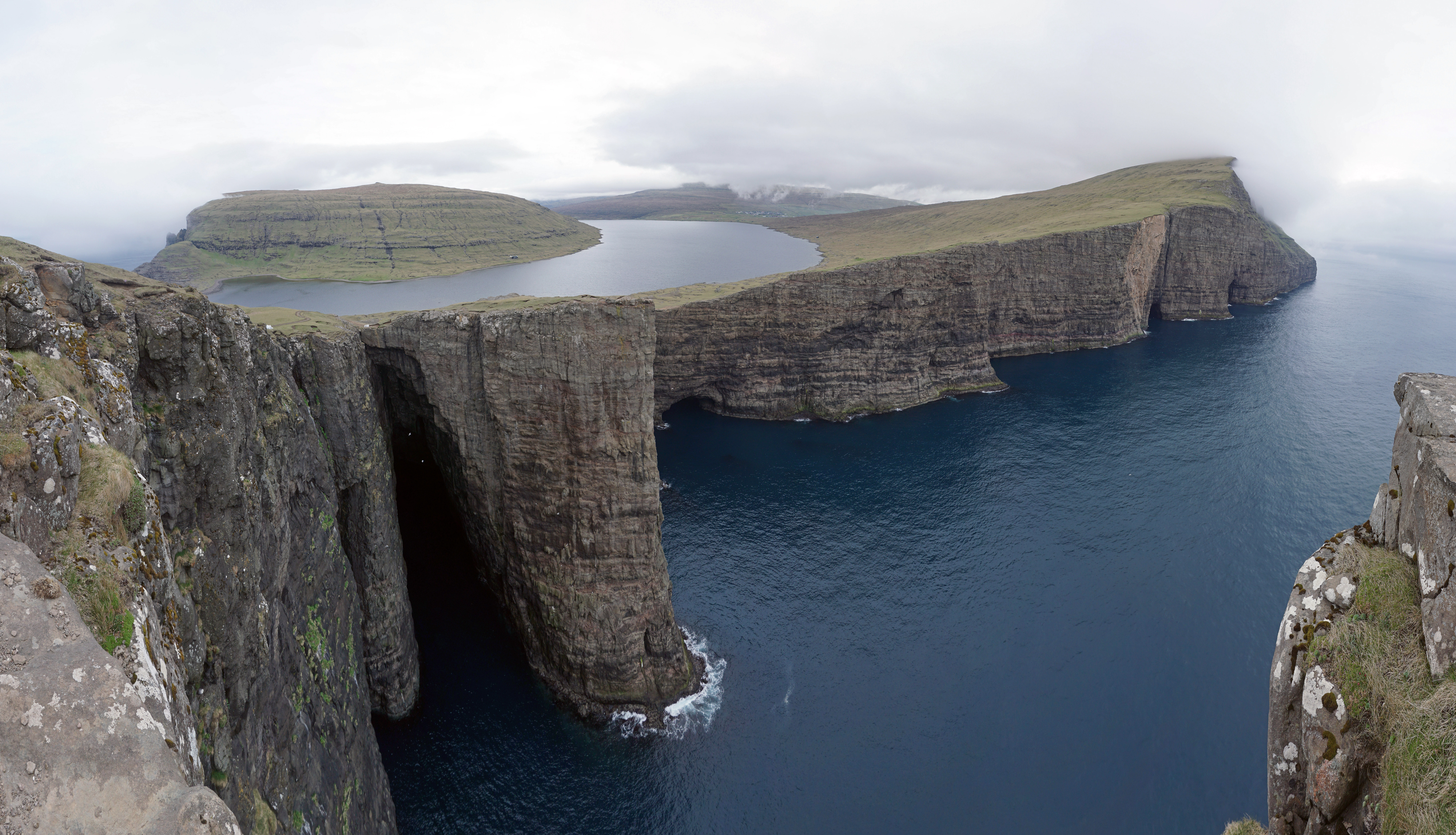 Sørvágsvatn seen from Trælanípan, Vágar, Faroe Islands.